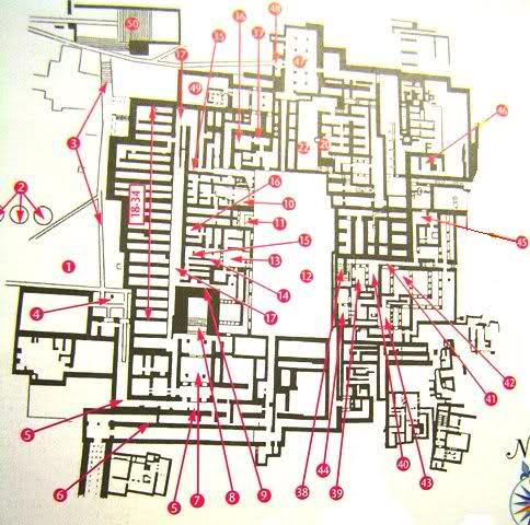 Estructura del palau de Cnossos. 1-Plaça Oest; 2-Sitges; 3-Carrer Reial; 4-Propileus Oest; 5-Corredor de las Processons; 6-Corredor del Príncep dels Lliris; 7-Grans Propileus; 8-Escala dels Grans Propileus; 9-Santuari de las Tres Columnes; 10-Saló del Tron; 11-Escala del Pati Central; 12-Pati Central; 13-Pati Petit; 14 a 16 Santuari Tripartit; 17-Corredor dels rebosts; 18 a 34 Rebosts i bodegues; 35-Corredor; 36 i 37 Arxiu; 38-Escala de l'Ala Est; 39-Lluerna de les Estances Reials; 40-Sala de la Guàrdia Reial; 41-Corredor Nord-est; 42- Sala de la Destral de Dos Fulles; 43- Mègaron de la Reina; 44-Bany de la Reina; 45-Tenda del Picapedrer; 46-Magatzem; 47-Sala Hipòstila; 48-Propileus Nord; 49-Santuari Extramurs; 50-Teatre